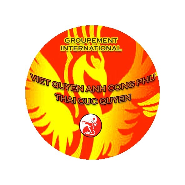 Ceci est le logo du groupement international viet quyen anh (kung fu vietnamien)